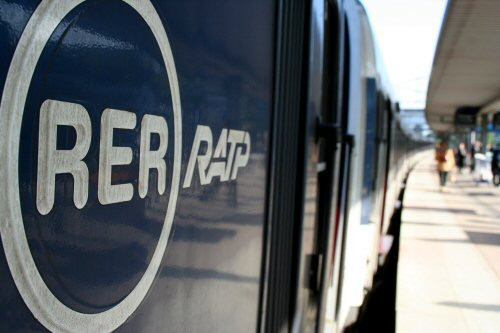 RER(France)